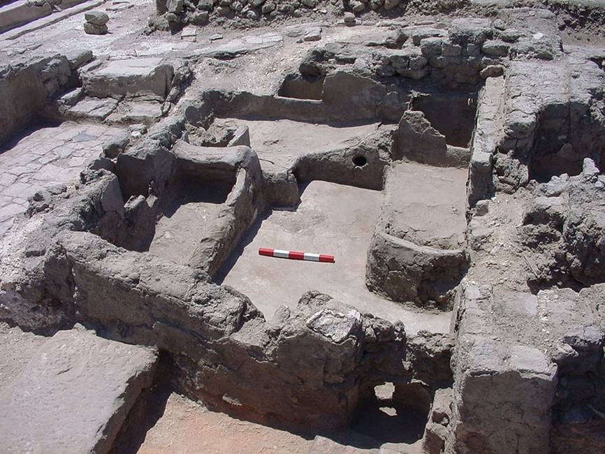 Schlafzellen im Kloster Deir El-Bachit, Theben